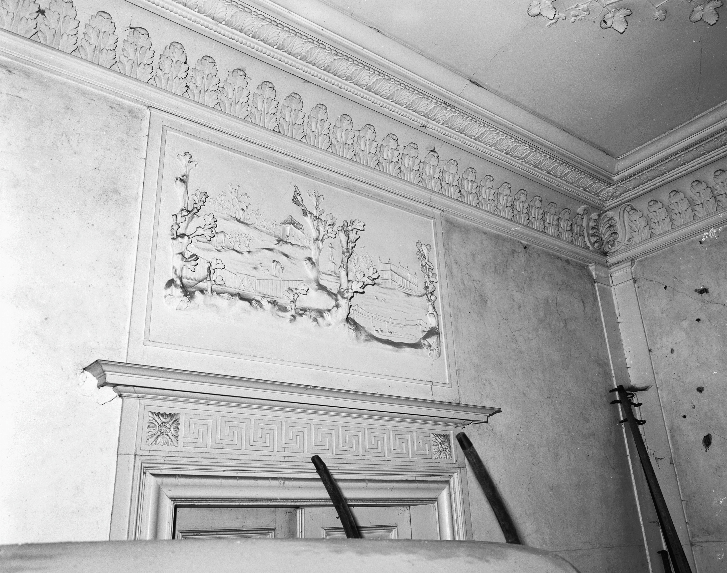 Huis Reuversweerd: stuc. reli‰f in voorhal